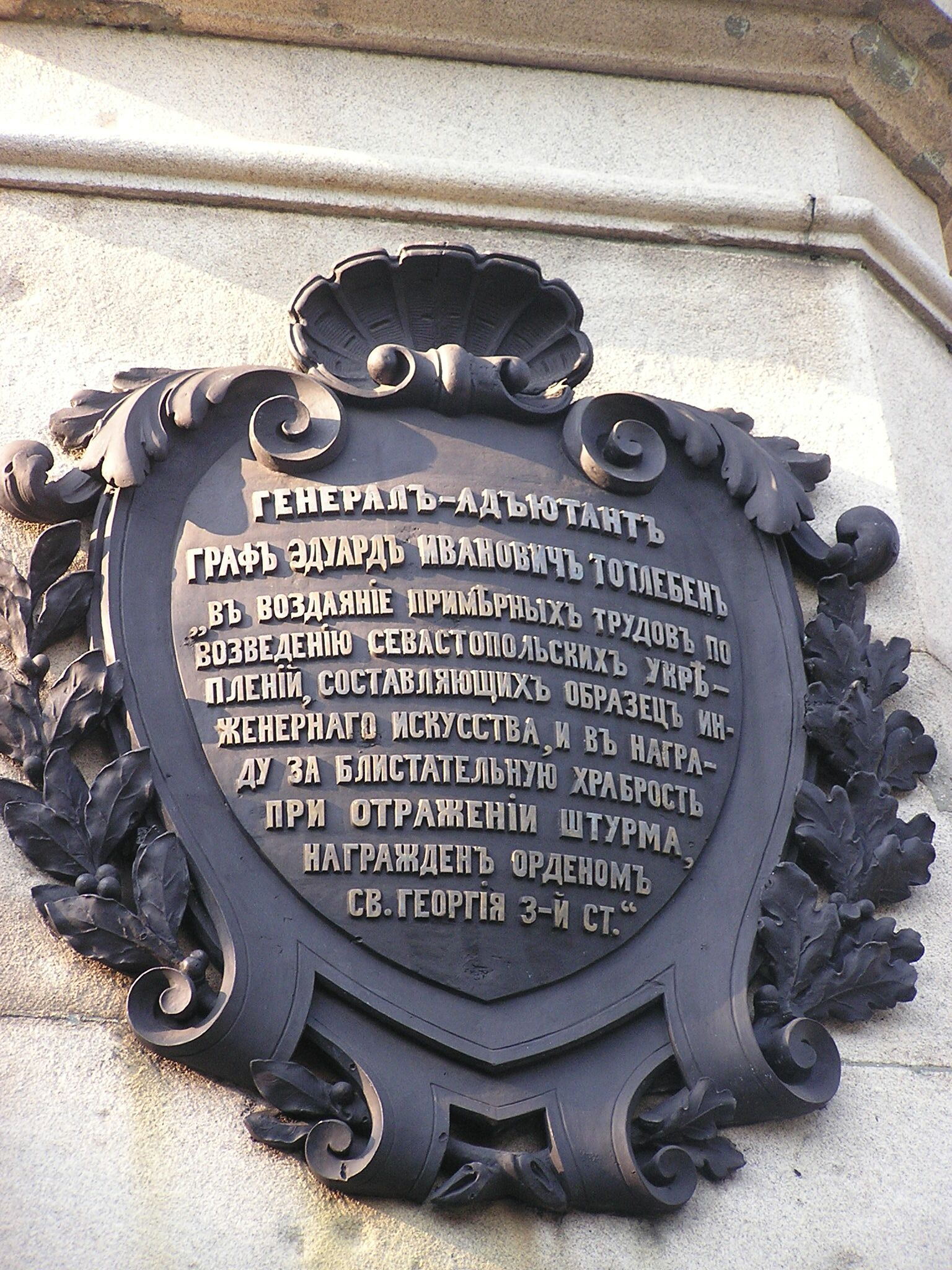 Севастополь. Памятник Тотлебену